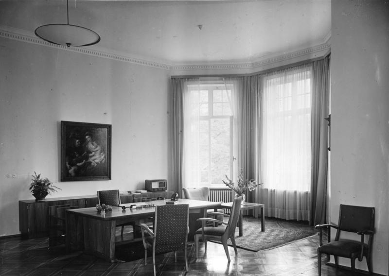 Haus des Bundeskanzlers (Palais Schaumburg), Bonn, Koblenzer Straße. Arbeitszimmer des Bundeskanzlers; Blick auf Schreibtisch. Die Gemälde des Palais sind Leihgaben aus Kölner und Münchener Galerien.